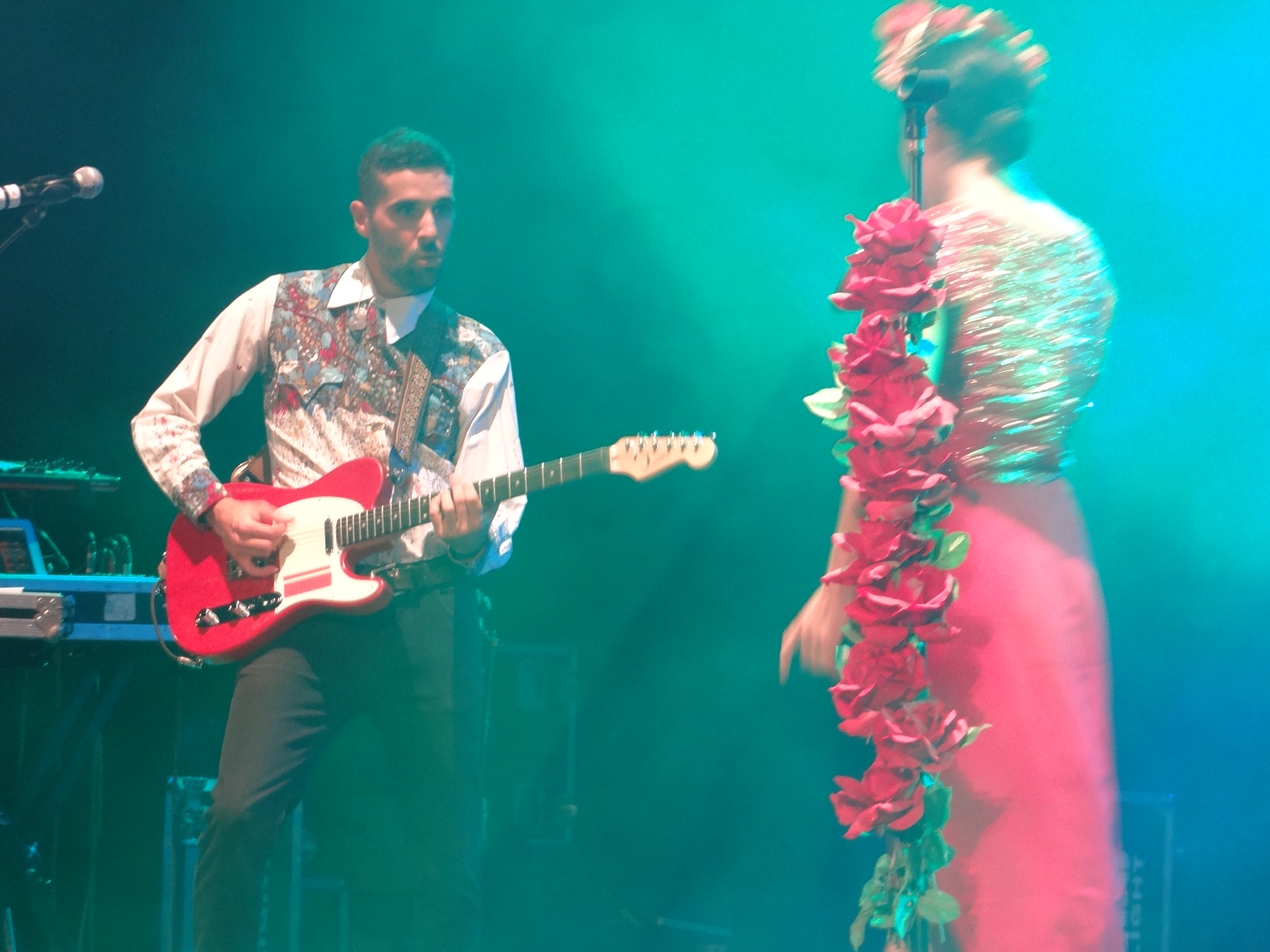 Alejandro Acosta, junto a Cristina Manjón, durante la actuación de Fuel Fandango en el festival La Mar de Músicas (Cartagena, 16 de julio de 2016)